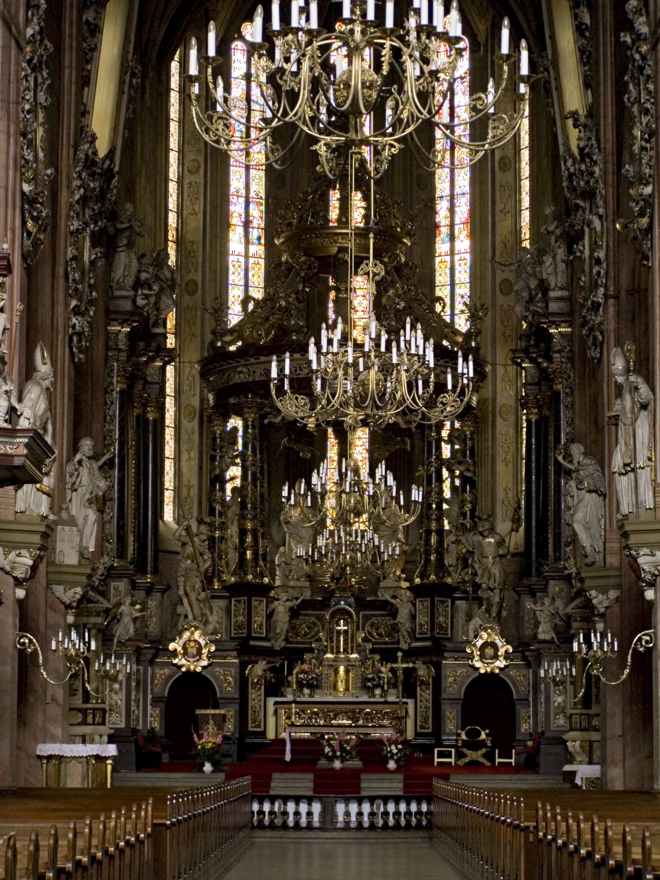 Świdnica, Katedrála svatého Václava a Stanislava